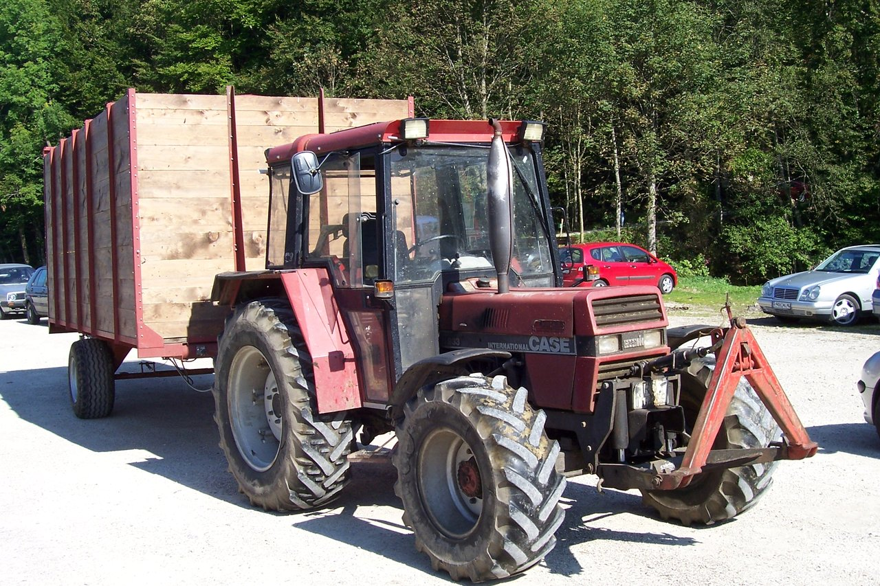 Case International 933 mit Weiste-Dreieck und Hänger